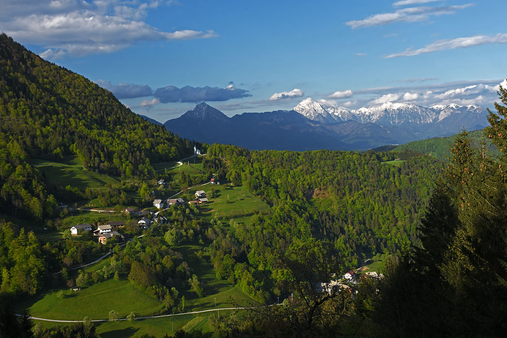 Lajše z Rožnika.